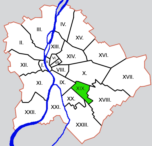 Budapest kerületei: XIX. kerület